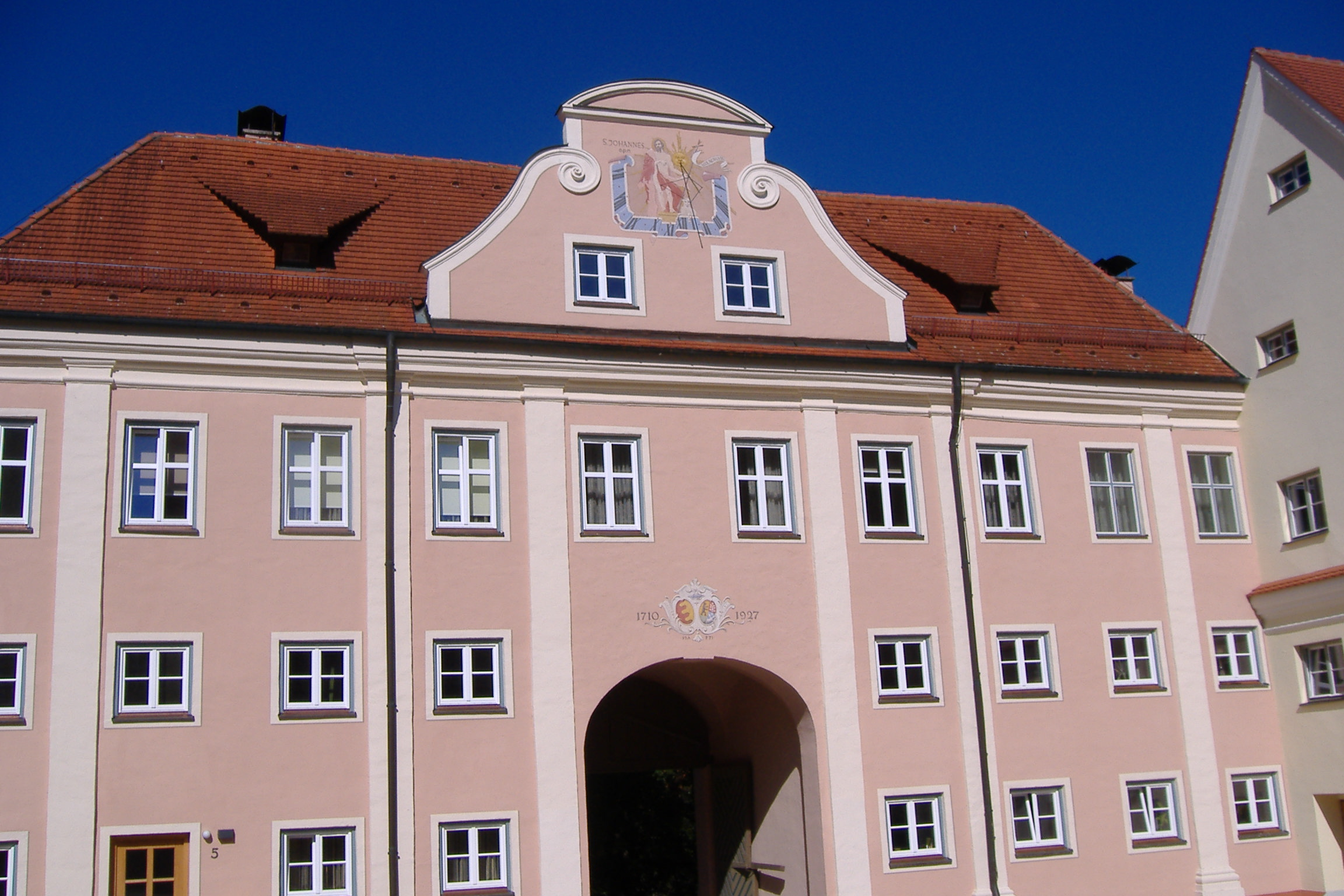 Torgebäude Kloster Holzen